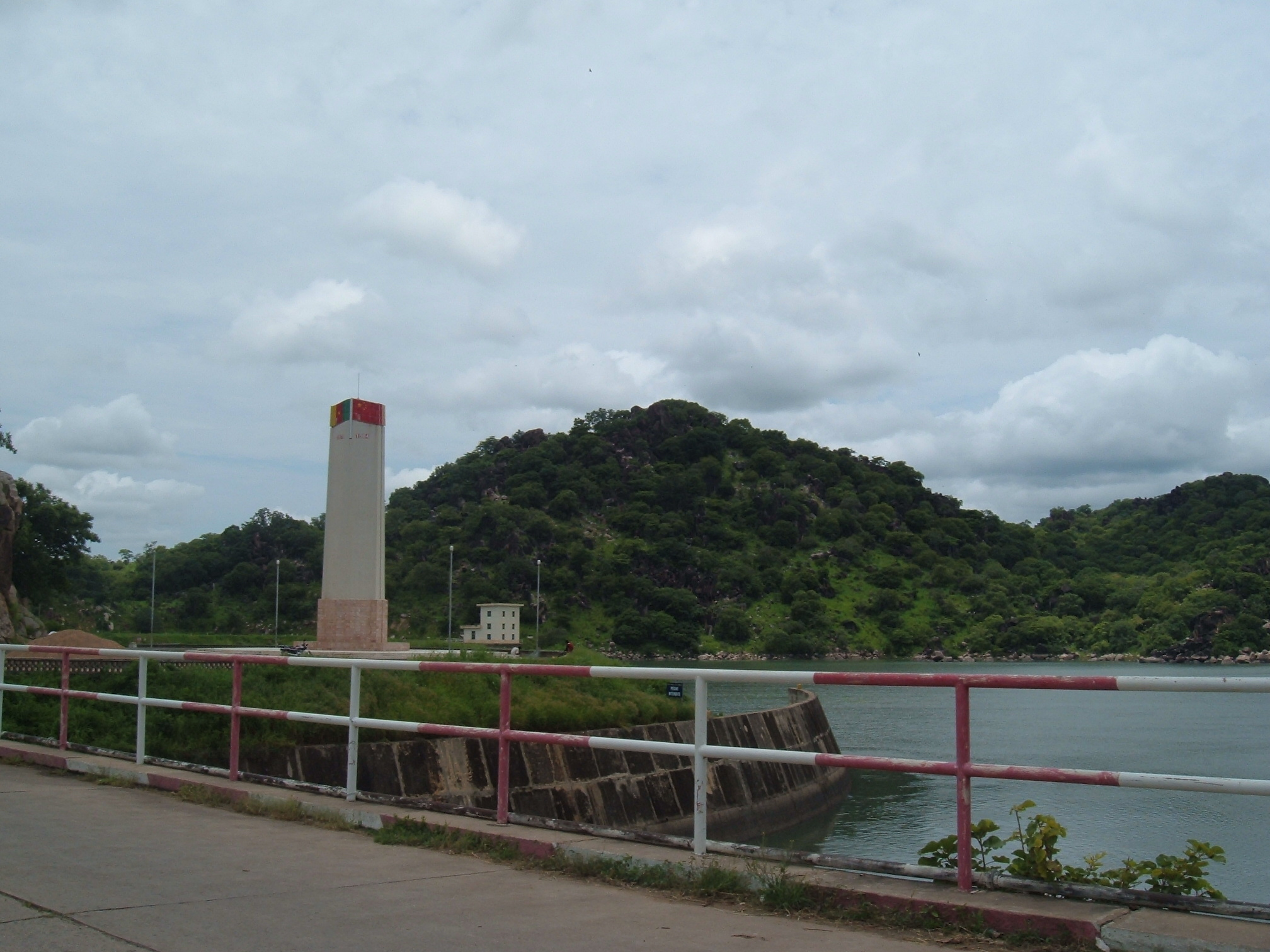 Barrage de Lagdo